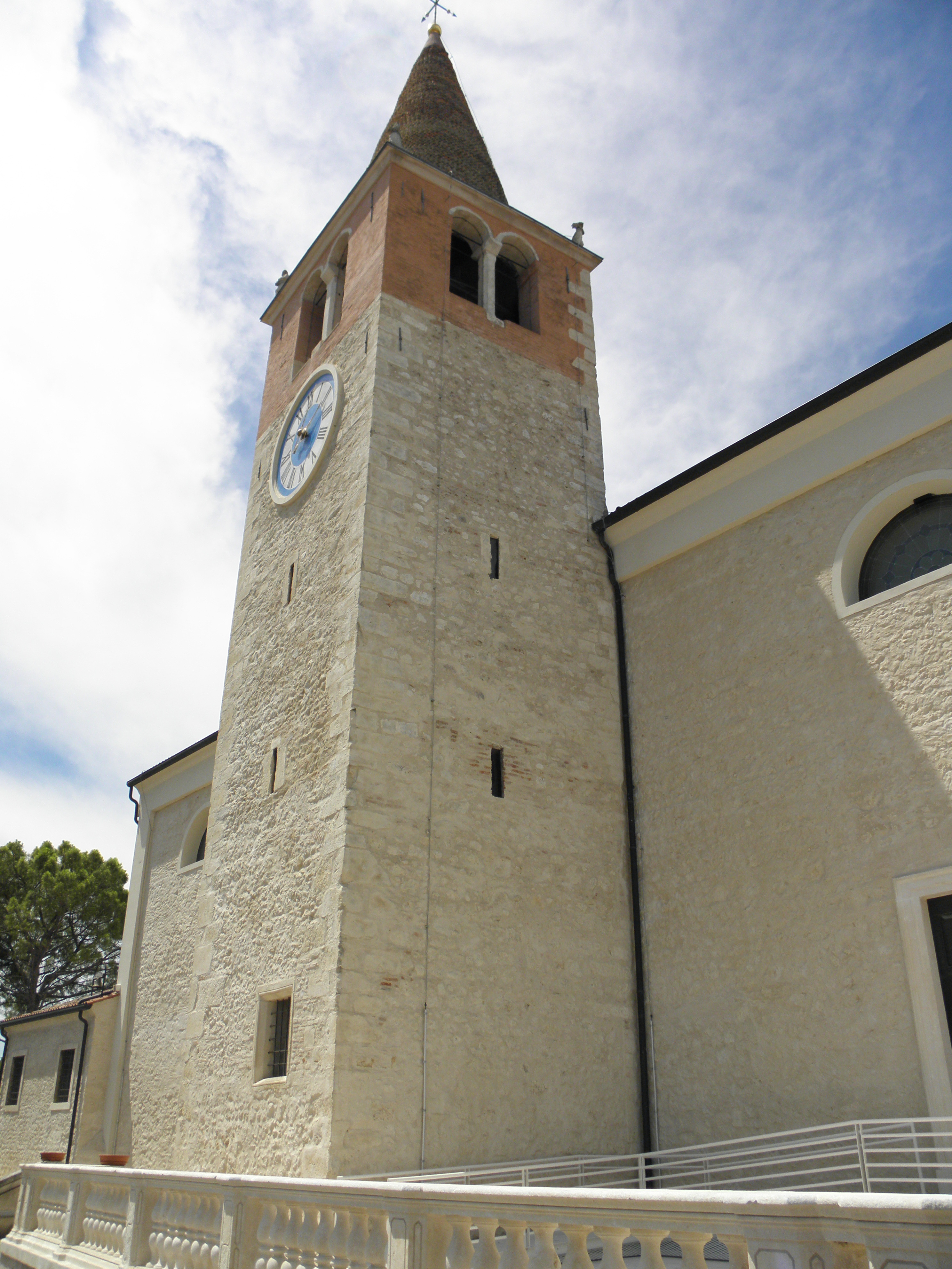 Orgiano, il campanile della chiesa parrocchiale di Santa Maria Assunta.